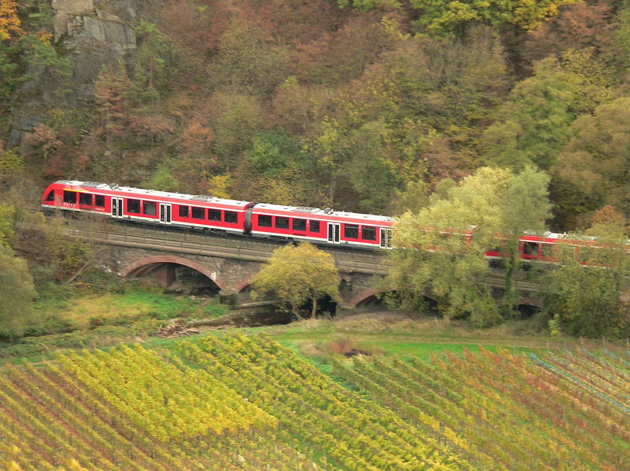 Ahrtalbahn überquert die Ahr bei Marienthal